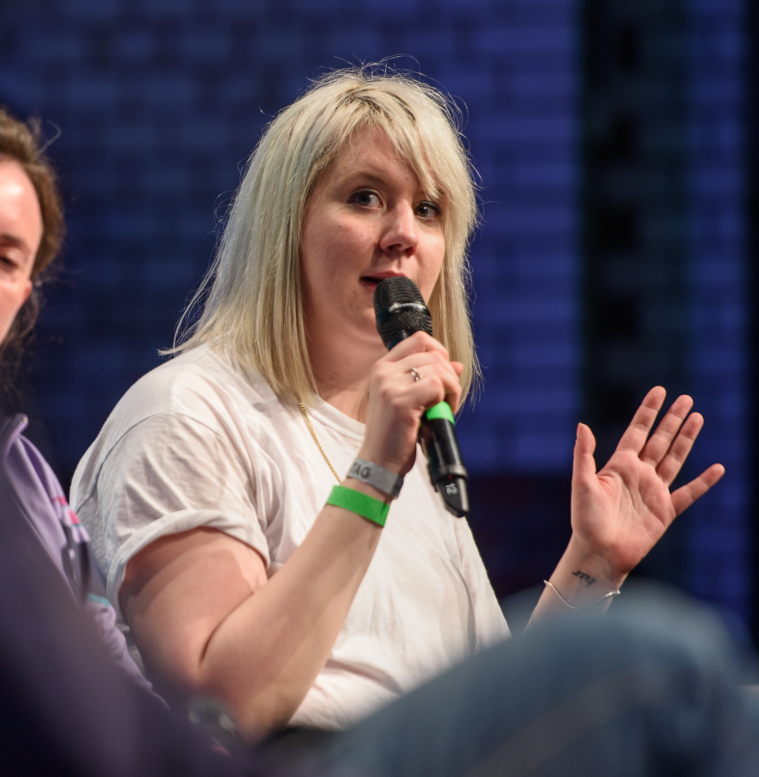 03.05.2018, Berlin: Discussion: Digitale Identität Speaker: Anika Meier, Rafael Horzon, Kristina Musholt, Kathrin Weßling, Andy Kassier Dirk von Gehlen Die re:publica ist eine der weltweit wichtigsten Konferenzen zu den Themen der digitalen Gesellschaft und findet in diesem Jahr vom 02. bis 04. Mai in der STATION-Berlin statt. Foto: Gregor Fischer/re:publica